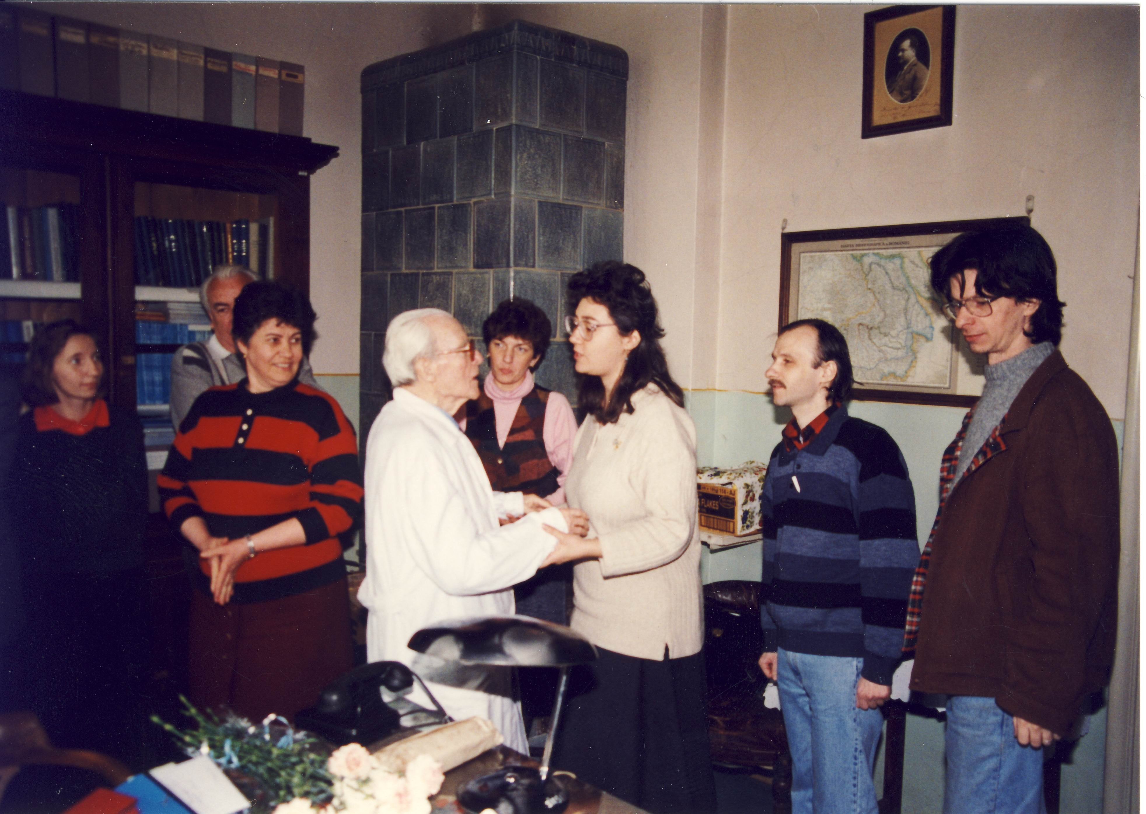 L'océanographe Mihai C. Bacescu au Muséum national d'Histoire naturelle Grigore Antipa de Bucarest